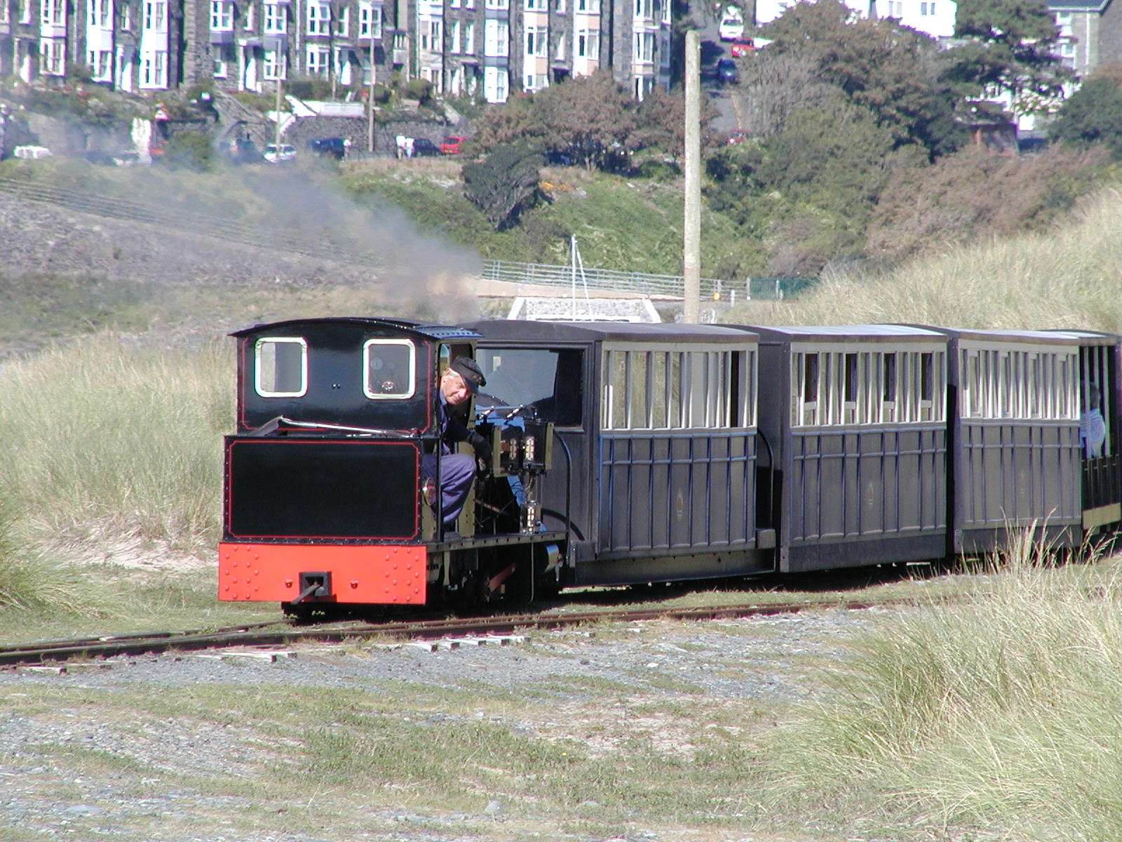 Rheilffordd Fairbourne, Ffriog